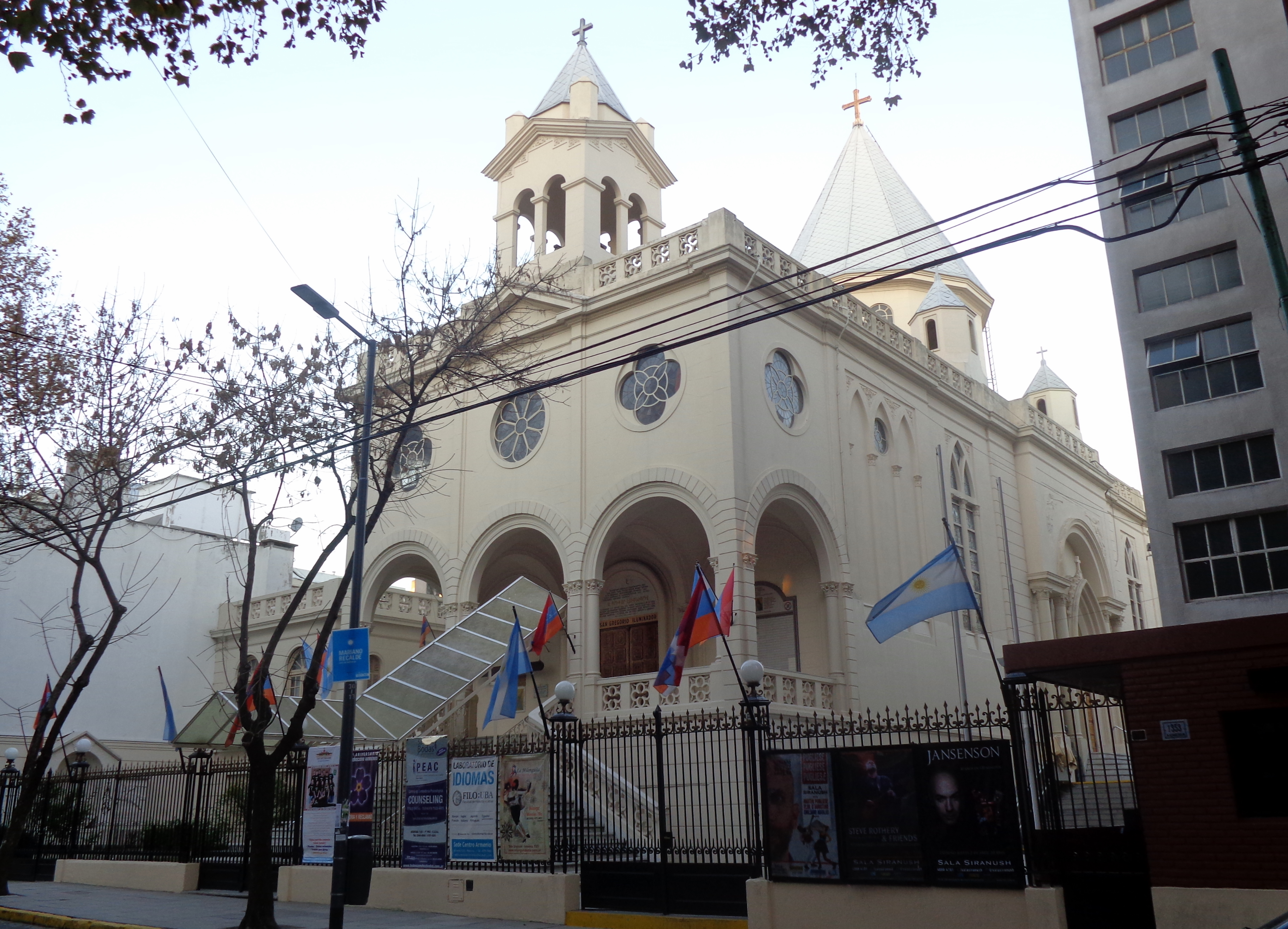 Centro Armenio, en calle Armenia 1353, Barrio de Palermo, Buenos Aires, Argentina.